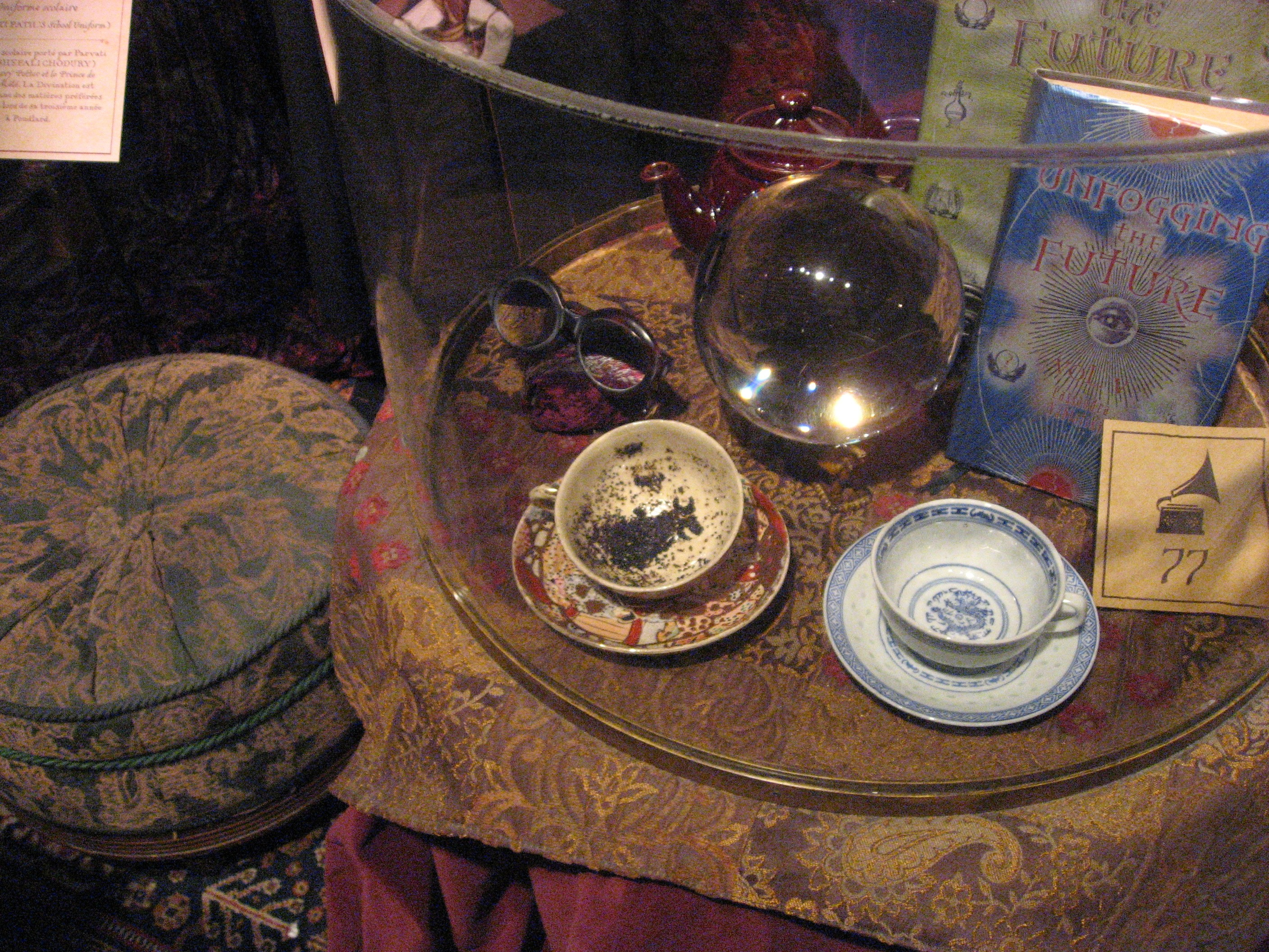 Accesoires du cours de divination, Harry Potter Exhibition, Cité du Cinéma, Saint Denis (Paris) avril 2015